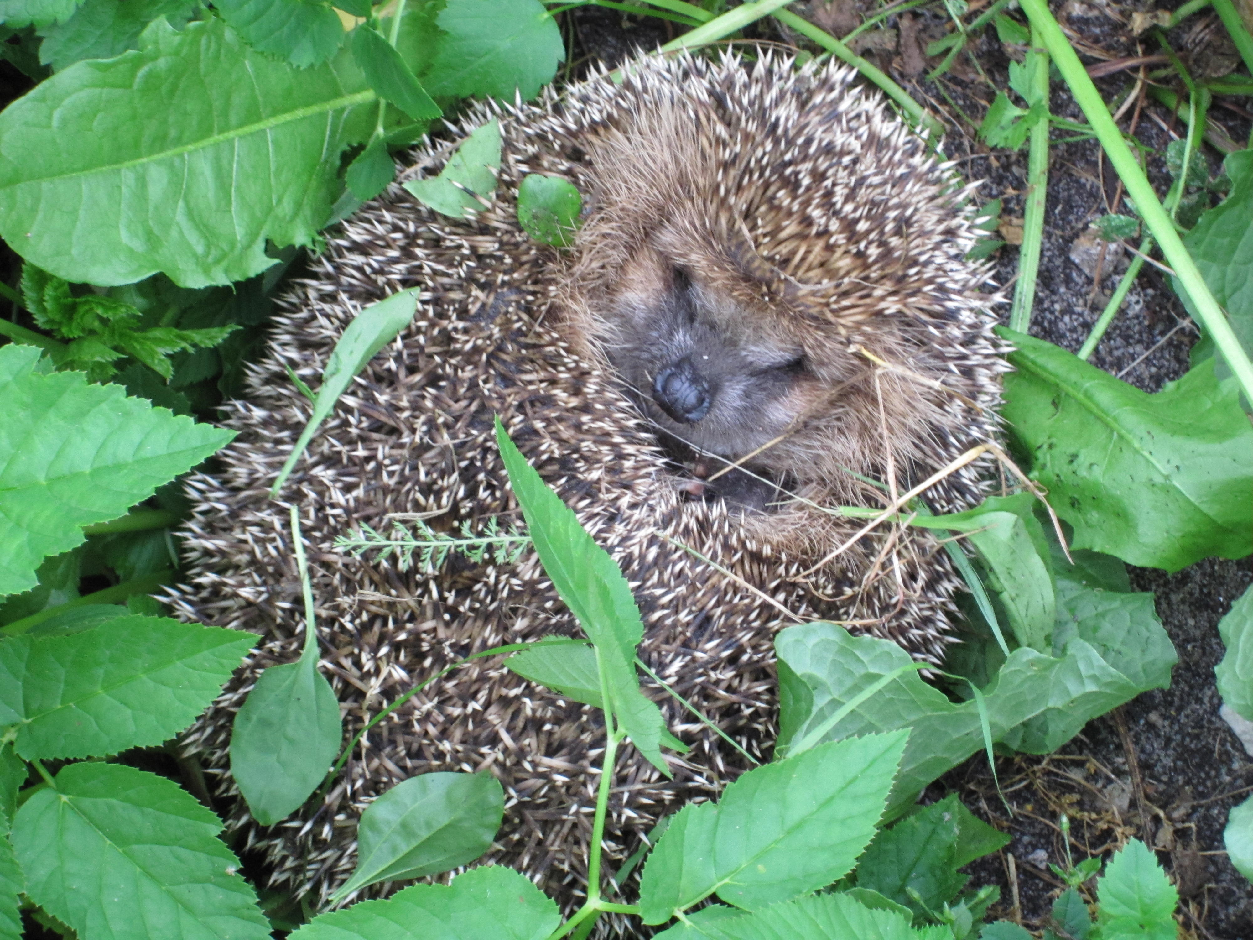 Pildistatud Perakülas Nõva vallas Läänemaal.